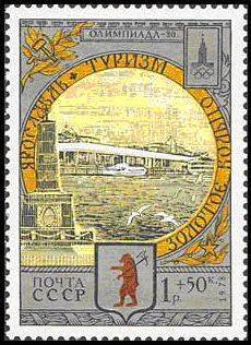 Речной вокзал и памятник Вечной Славы борцам за становление Советской власти в Ярославле на марке СССР. ЦФА #4911